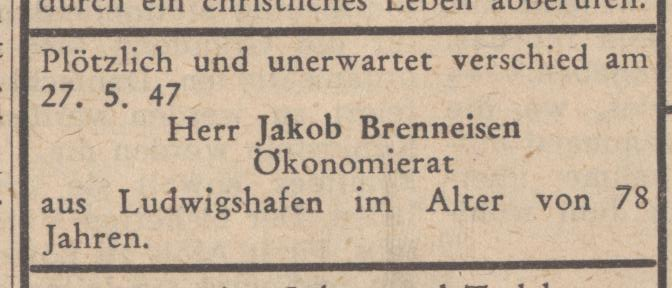 Todesanzeige Jakob Brenneisen, bay. Landtagsabgeordneter